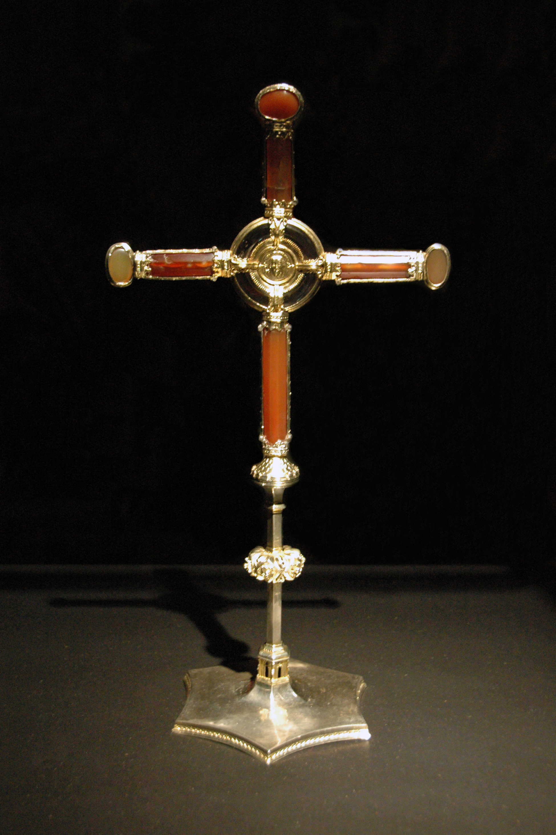 Gotisches Kreuz mit Achat, zweites Viertel 14. Jahrhundert, aus dem Essener Domschatz